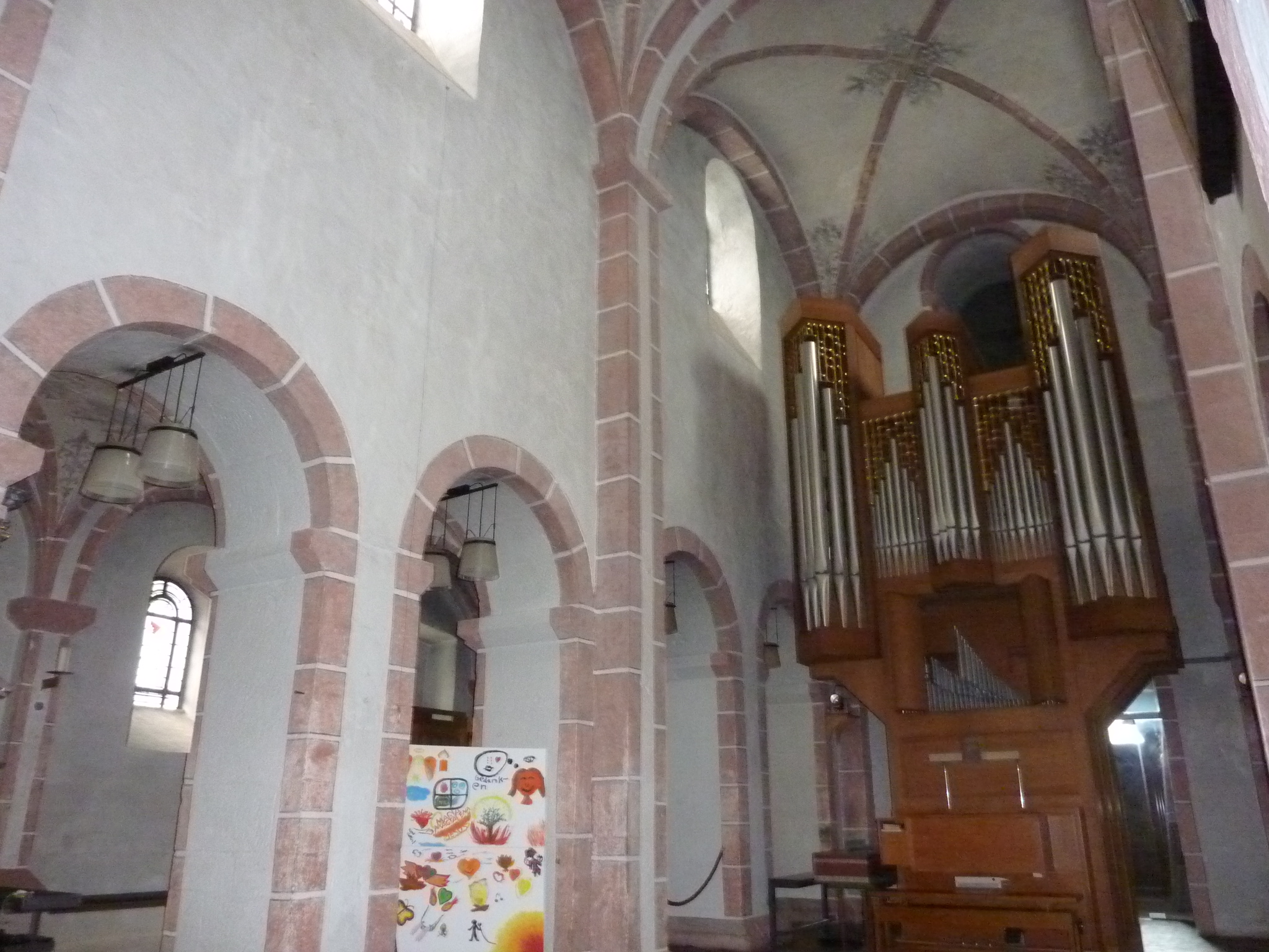 St. Antonius Abbas (Herkenrath)